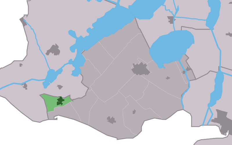 Kaartsje fan himrik fan Bakhuzen